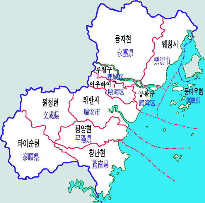 웬조우 지급행정구역도